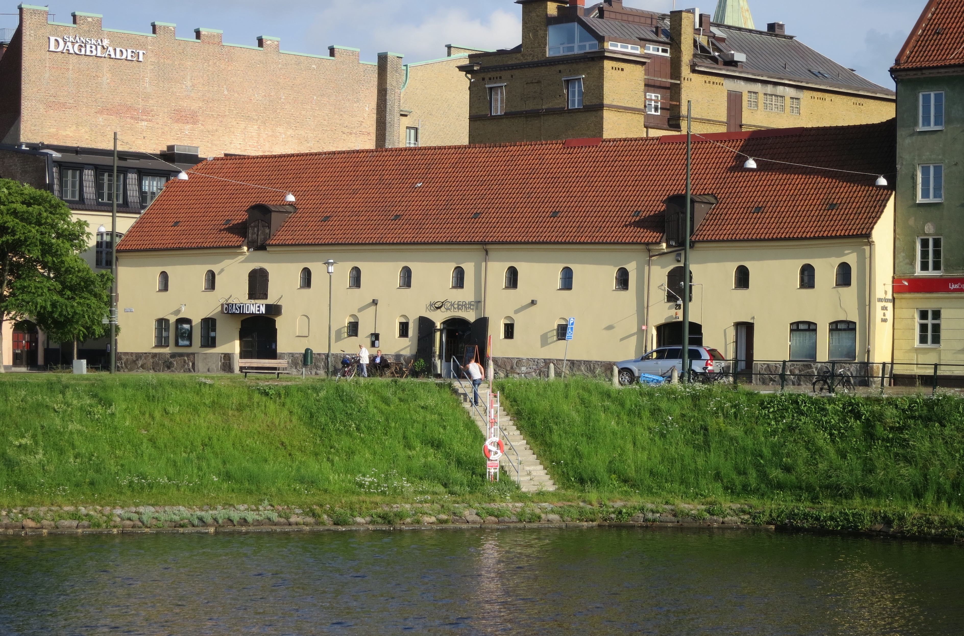 Teaterhuset Bationen, Malmö